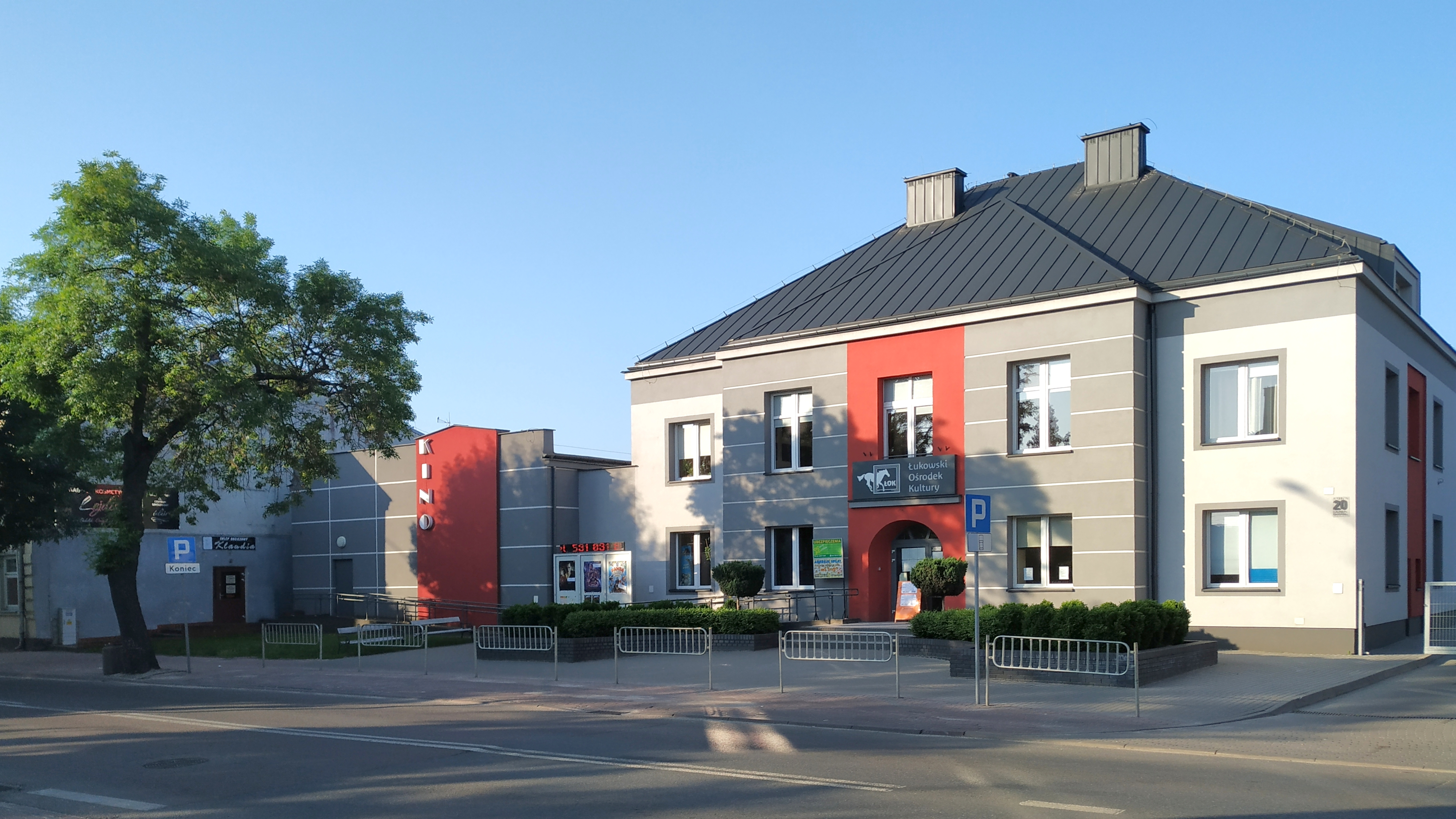 Budynek Łukowskiego Ośrodka Kultury i Kina Łuków